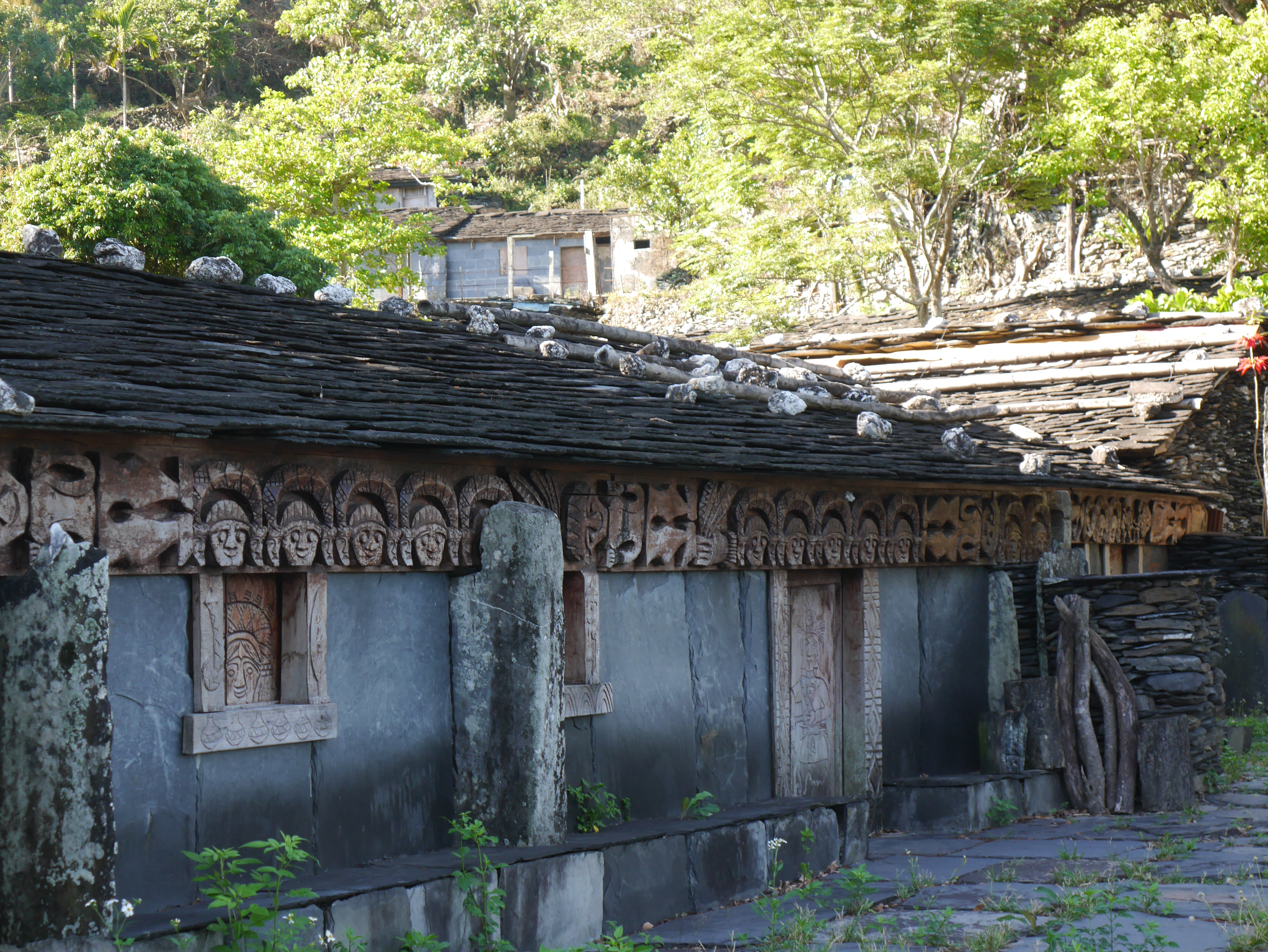 中文（台灣）: 石板屋 老七佳 部落 排灣族 原住民